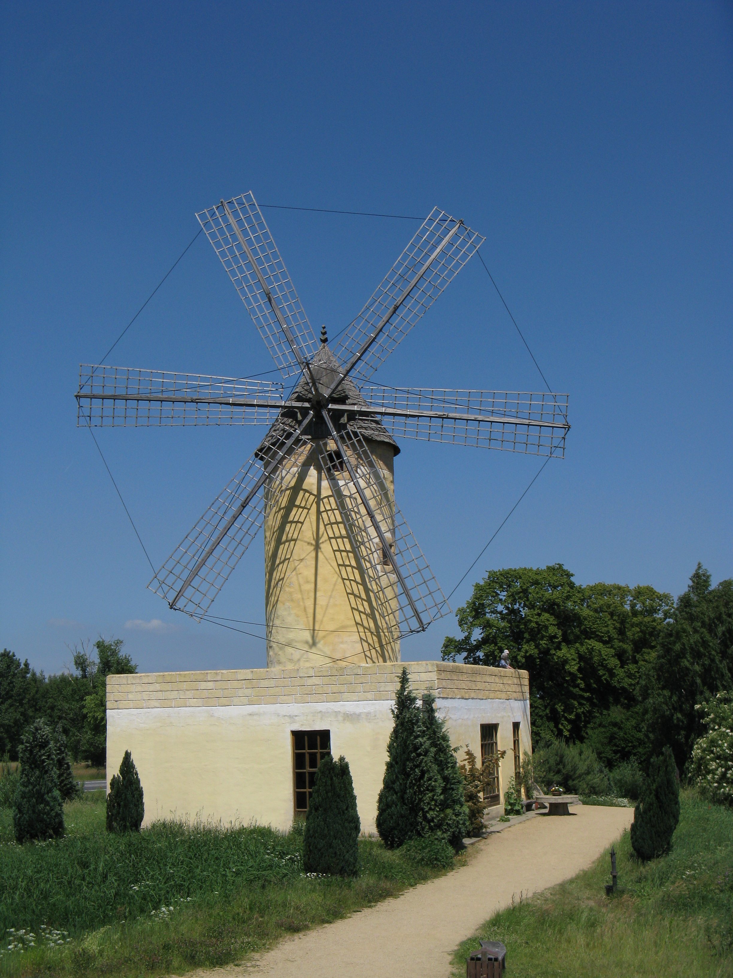 Mühlenmuseum Gifhorn: mallorcinische Mühle